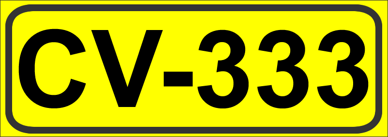 Inidcador de la Carretera de la Comunidad Valenciana CV-333